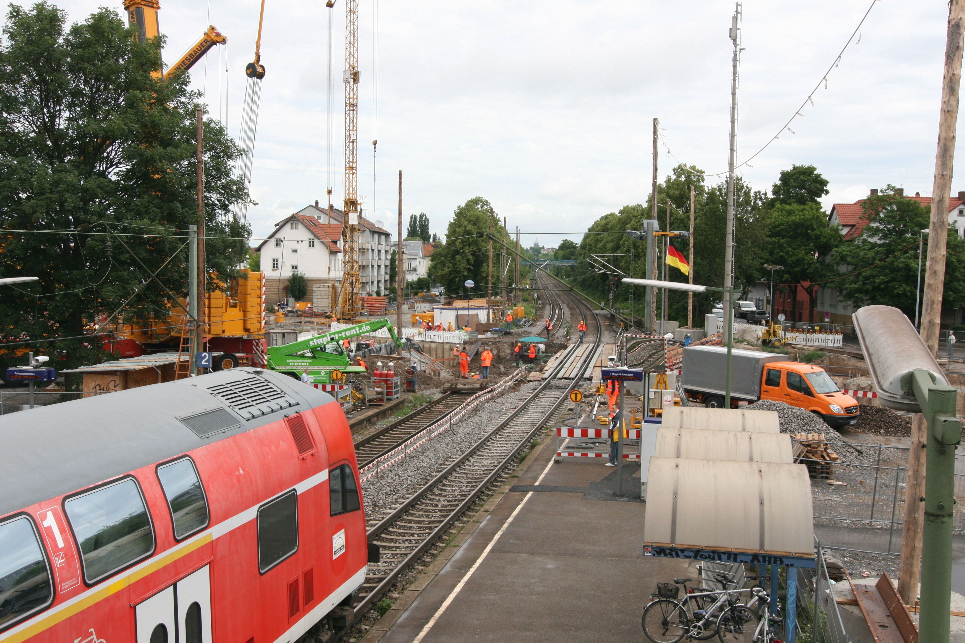 Einsetzung einer Hilfsbrücke bei der Großbaustelle Unterführung Sülmertor des Bauvorhabens Stadtbahn Nord in Heilbronn